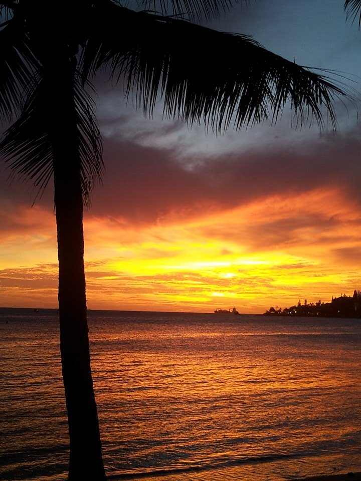 Coucher de soleil sur l'Anse Vata